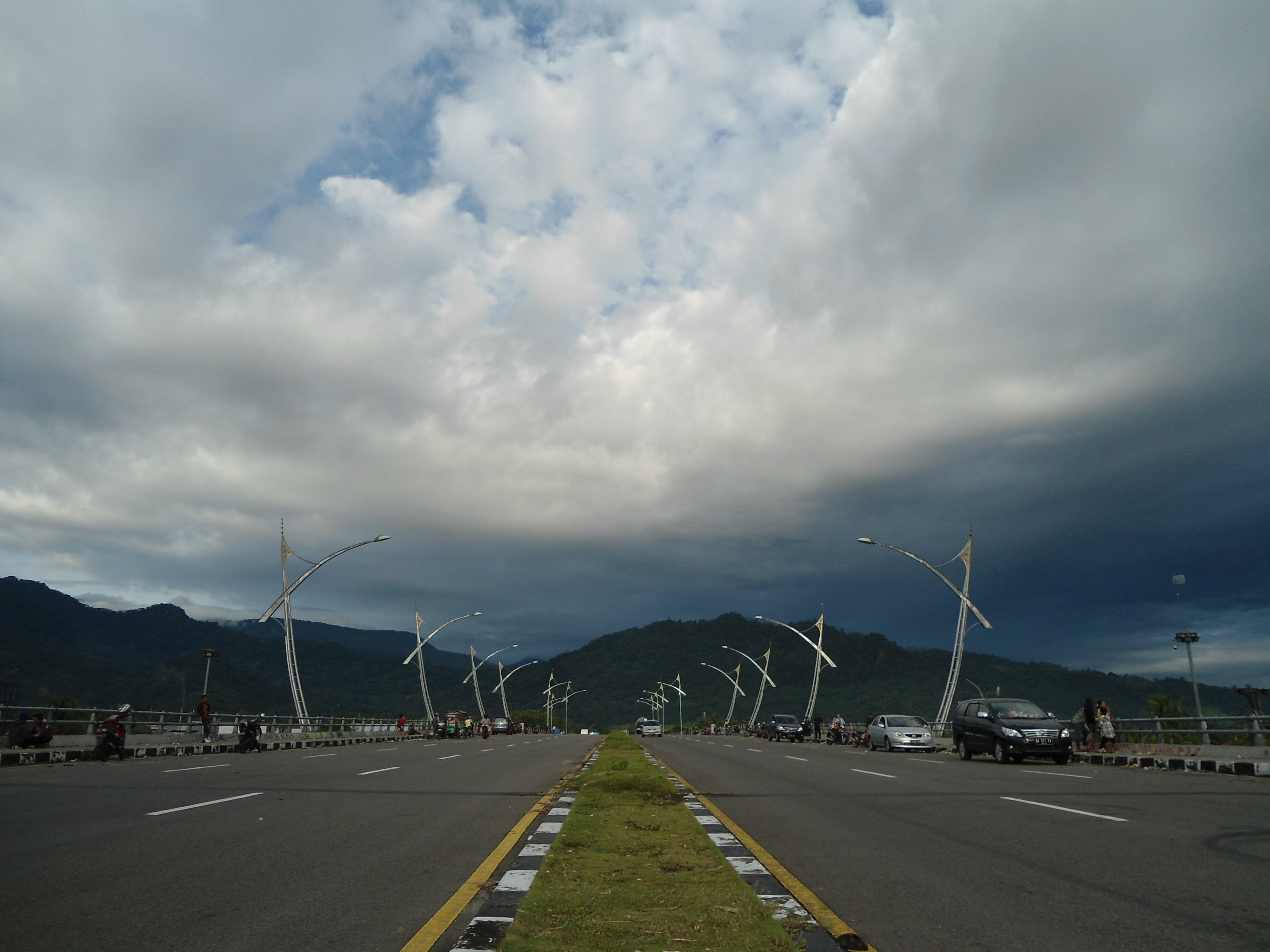 Jembatan layang menuju Bandara Internasional Minangkabau